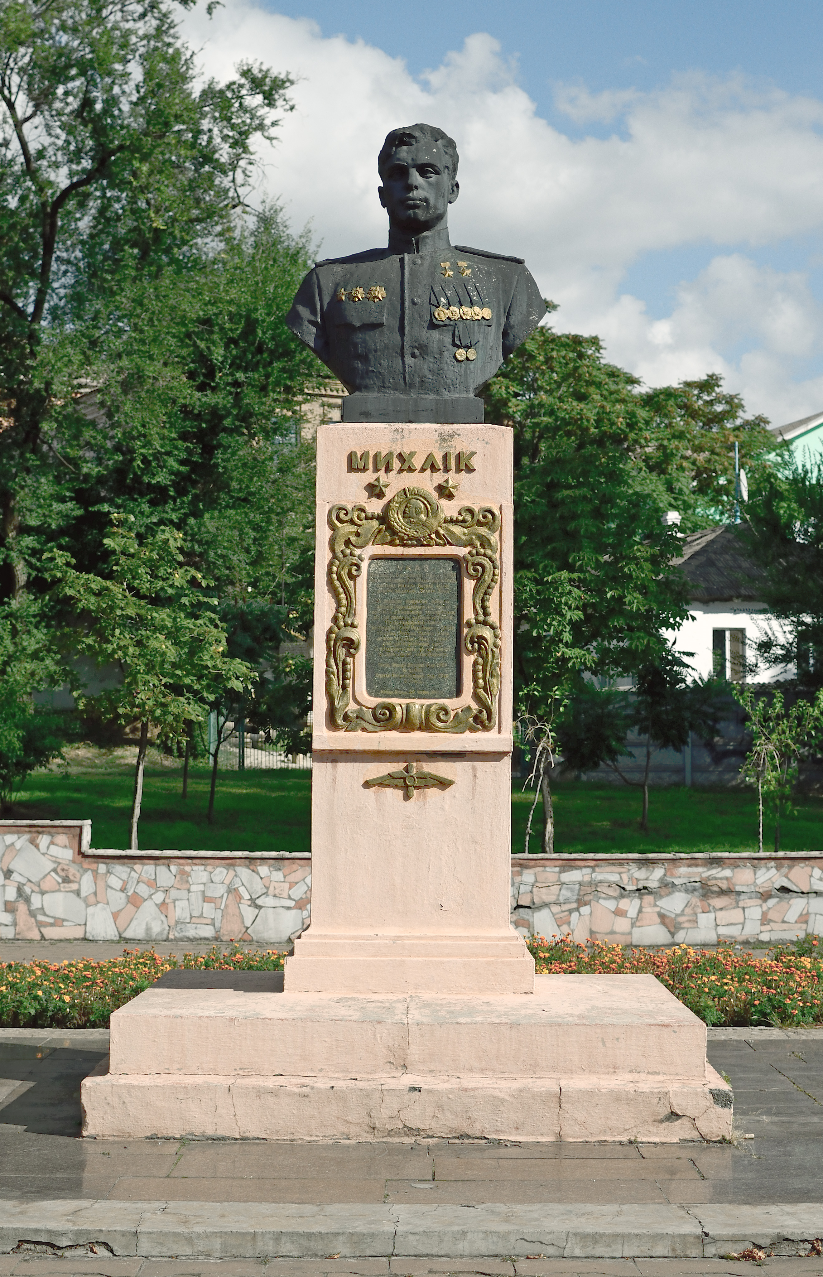 Бюст В.І. Михлика – двічі Героя Радянського Союзу, Кривий Ріг